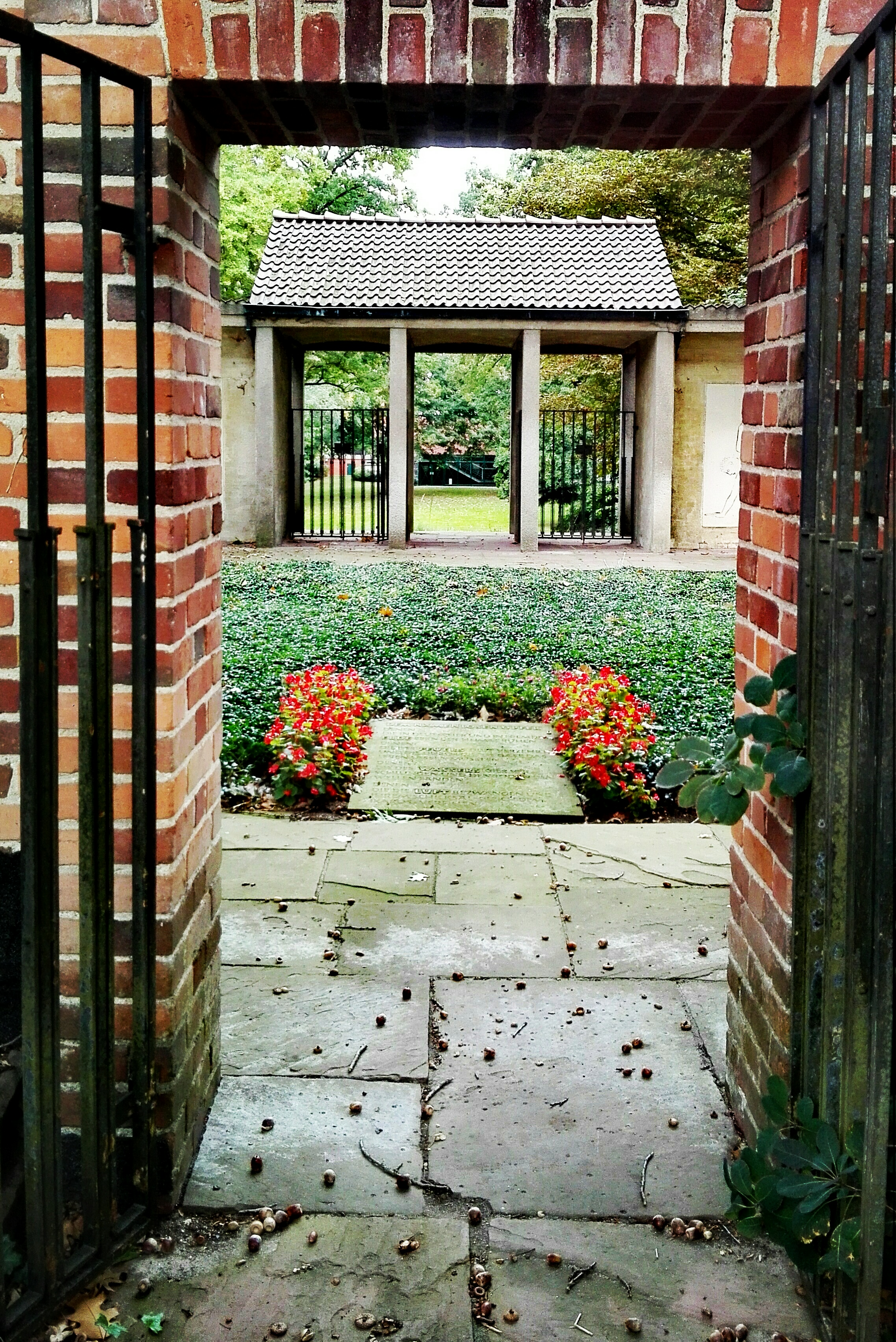 Von der Treppe zum Hintereingang aus sehen wir den den Schriftzug "Dem namenlosen Opfer denen die in deutscher und in fremder Erde fern der Heimat ruhen denen die des Feuers Glut verzehrte und die durch giftige Gase das Leben lassen mussten denen die des Wassers Gier verschlungen und den Tod in den Wellen fanden denen die die Luft bezwangen und ihrem Schicksal - gleich dem Ikaros - verfielen" tragenden Gedenkstein des unbekannten Opfers, über das Gräberfeld zum Hauptportal hinter dem wir hinter dem einstigen Urnenfriedhof, heute Garten der Besinnung, das Krematorium sehen.